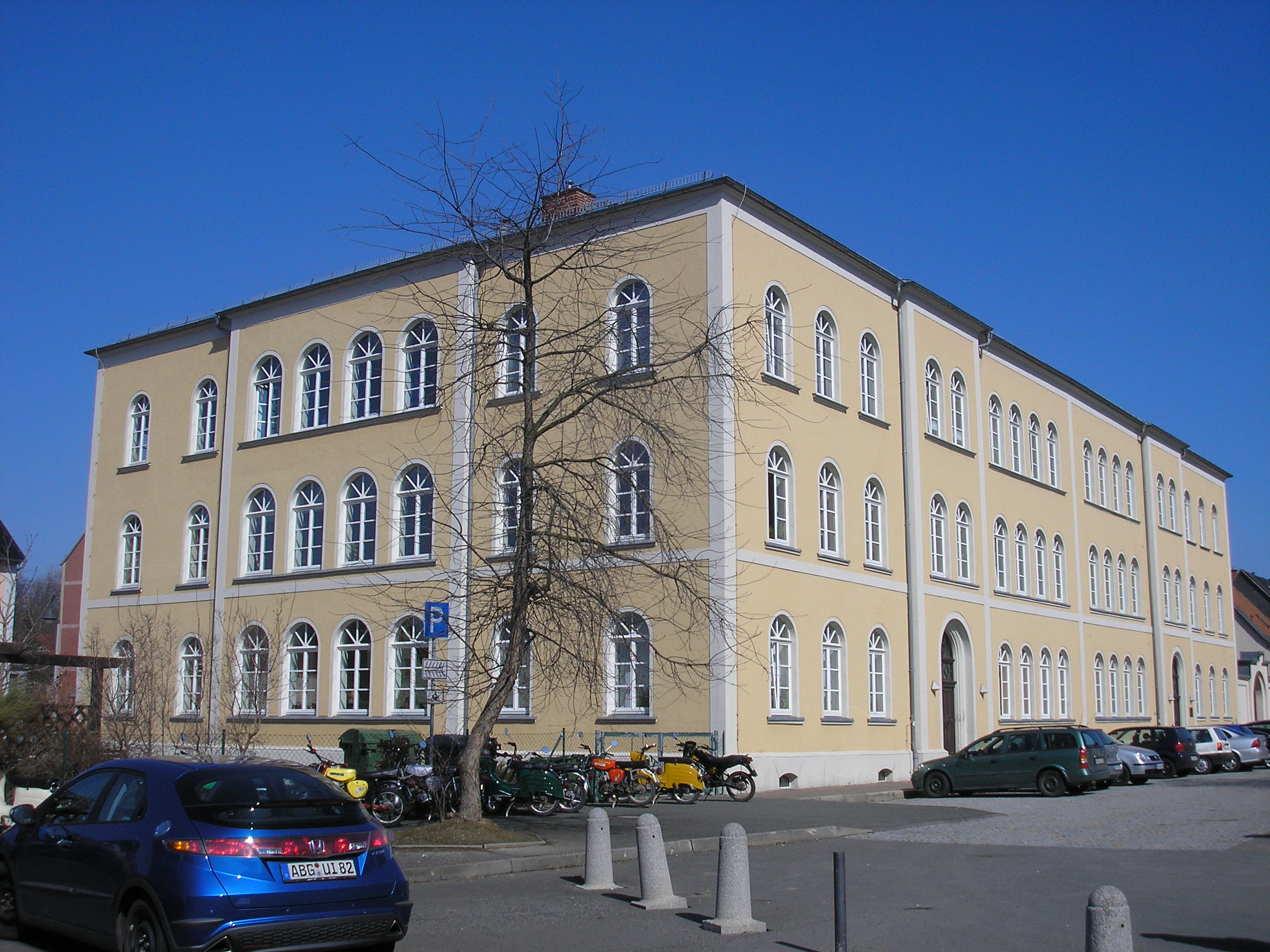 Roman-Herzog-Gymnasium in Schmölln (Thüringen).